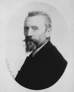 Carl Bloch, 1888, selvportrættet til Galleria degli Uffizi